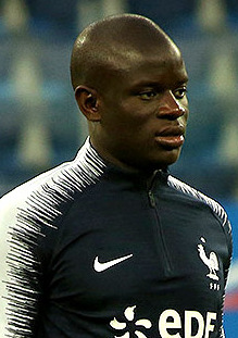 Звёзды сборной Франции готовятся к матчу с Россией